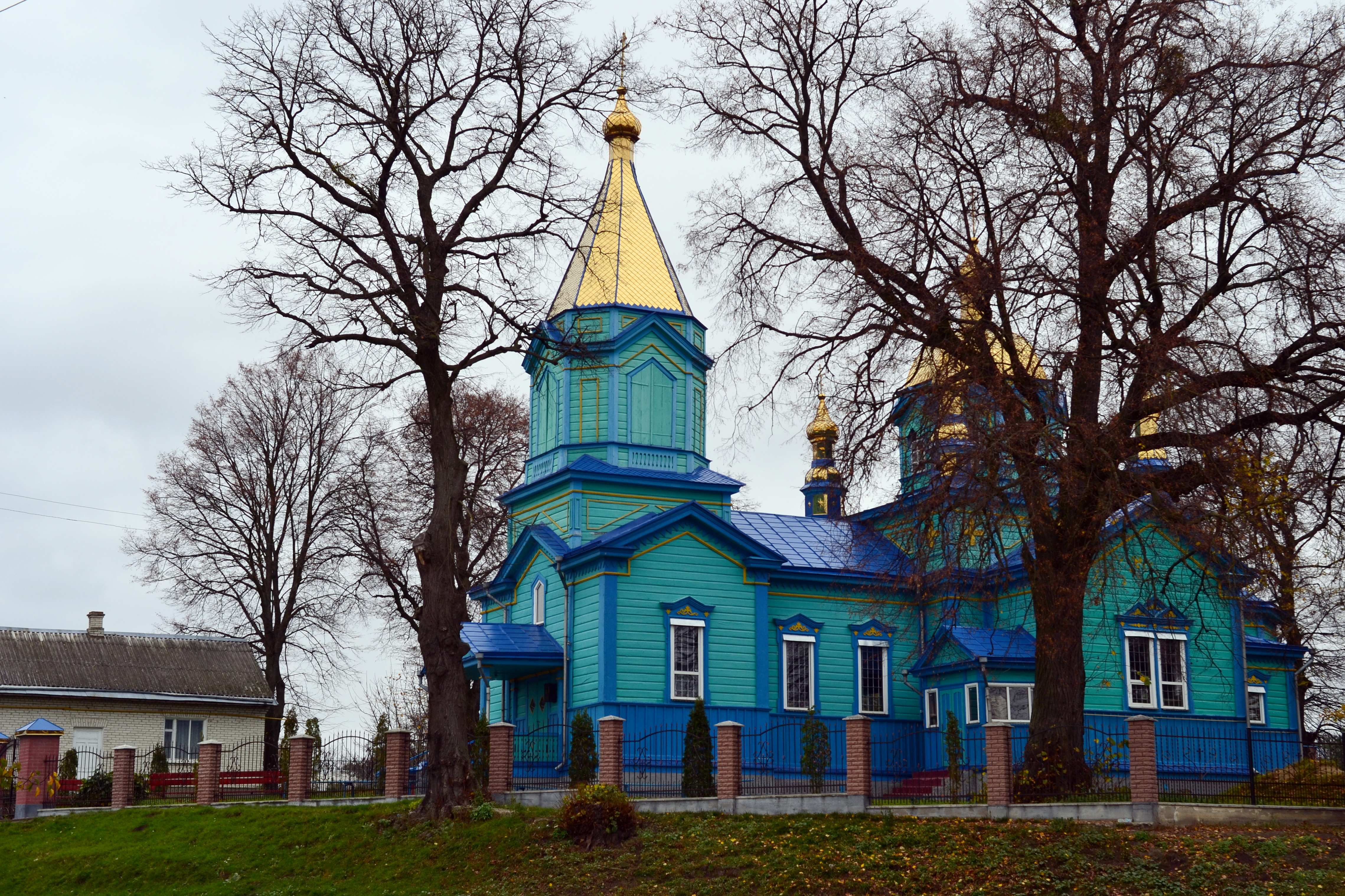 Введенська церква (дер.) (1890 рік) - вигляд з півдня - Цегів (вул. Незалежності) Горохівський район Волинська область Україна